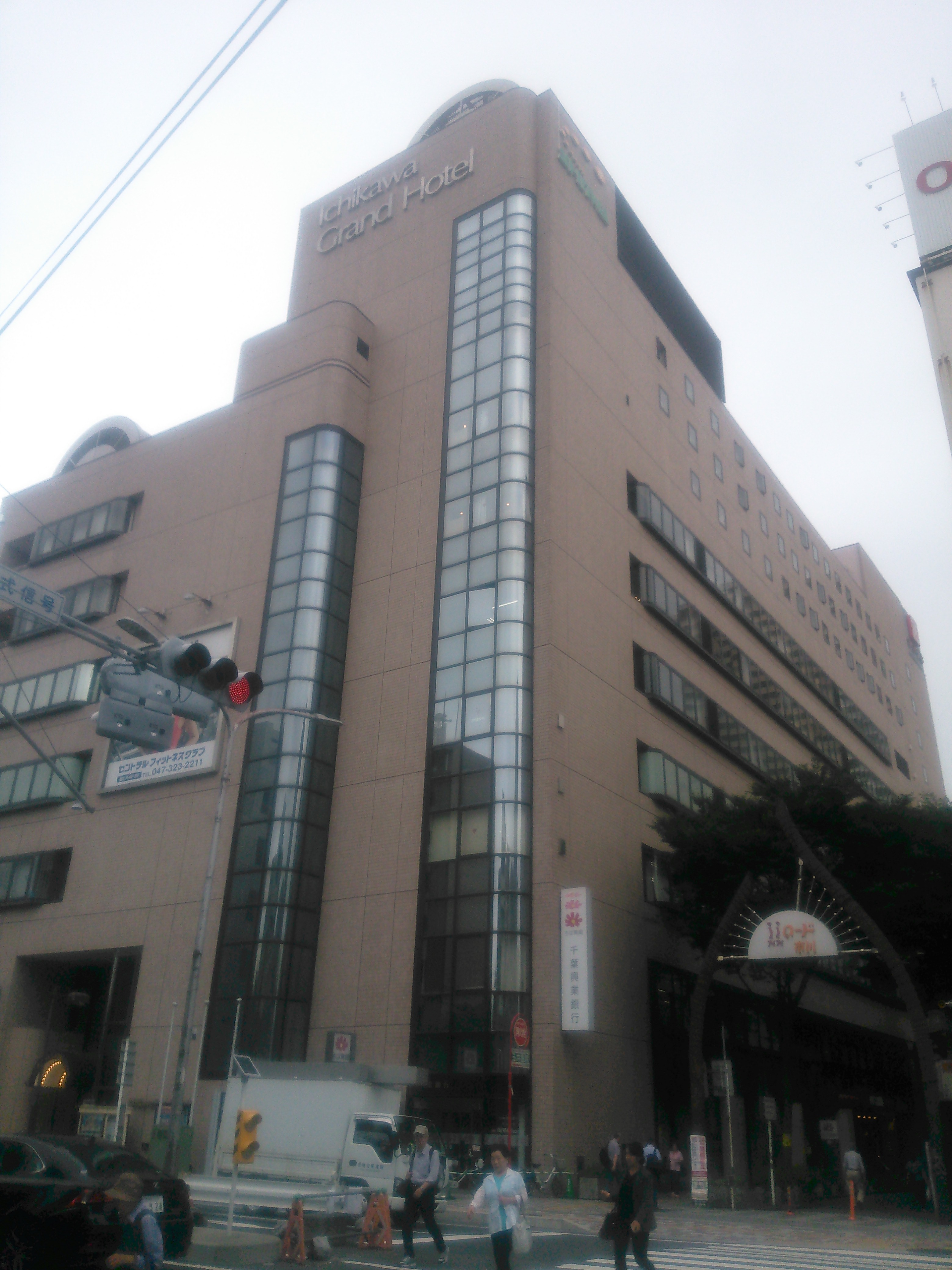 千葉県市川市、市川グランドホテル